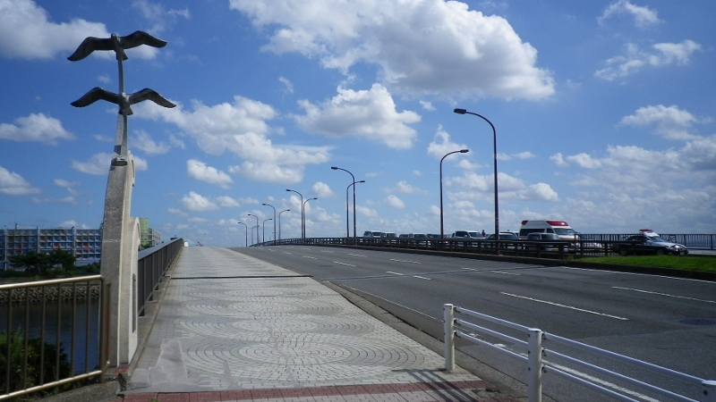 美浜大橋